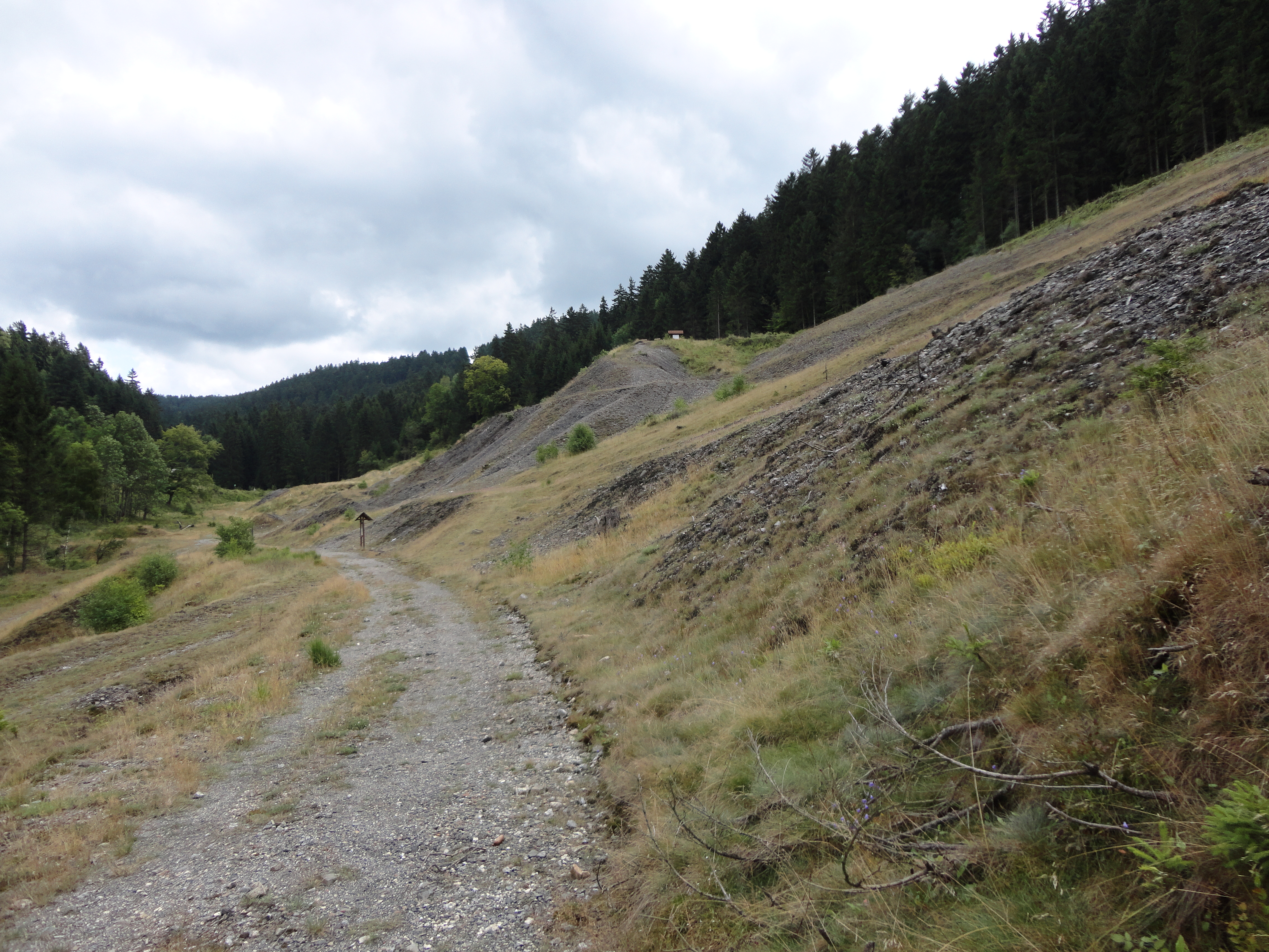 Haldenlandschaft am Kranichsberg in Lautenthal (Schwarze Grube)